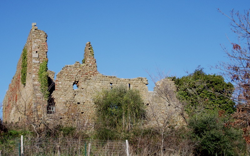 L'Abbazia di San Bartolomeo a Sestinga (Abbazia Nuova) presso Vetulonia (GR)